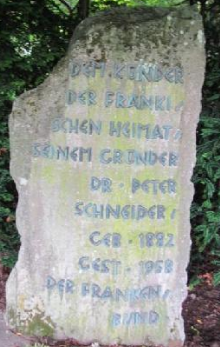 Gedenkstein auf dem Schwanberg für Dr. Peter Schneider, dem Gründer des Frankenbundes